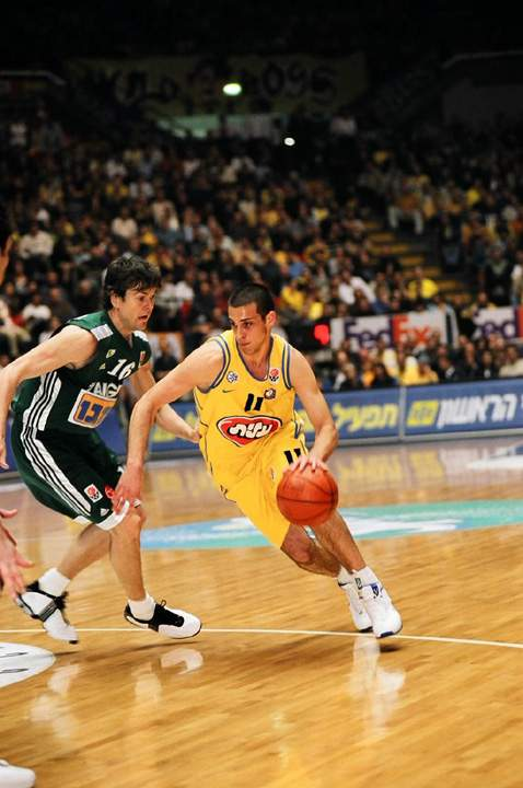 νΎοτάμ Ήάλπέρί